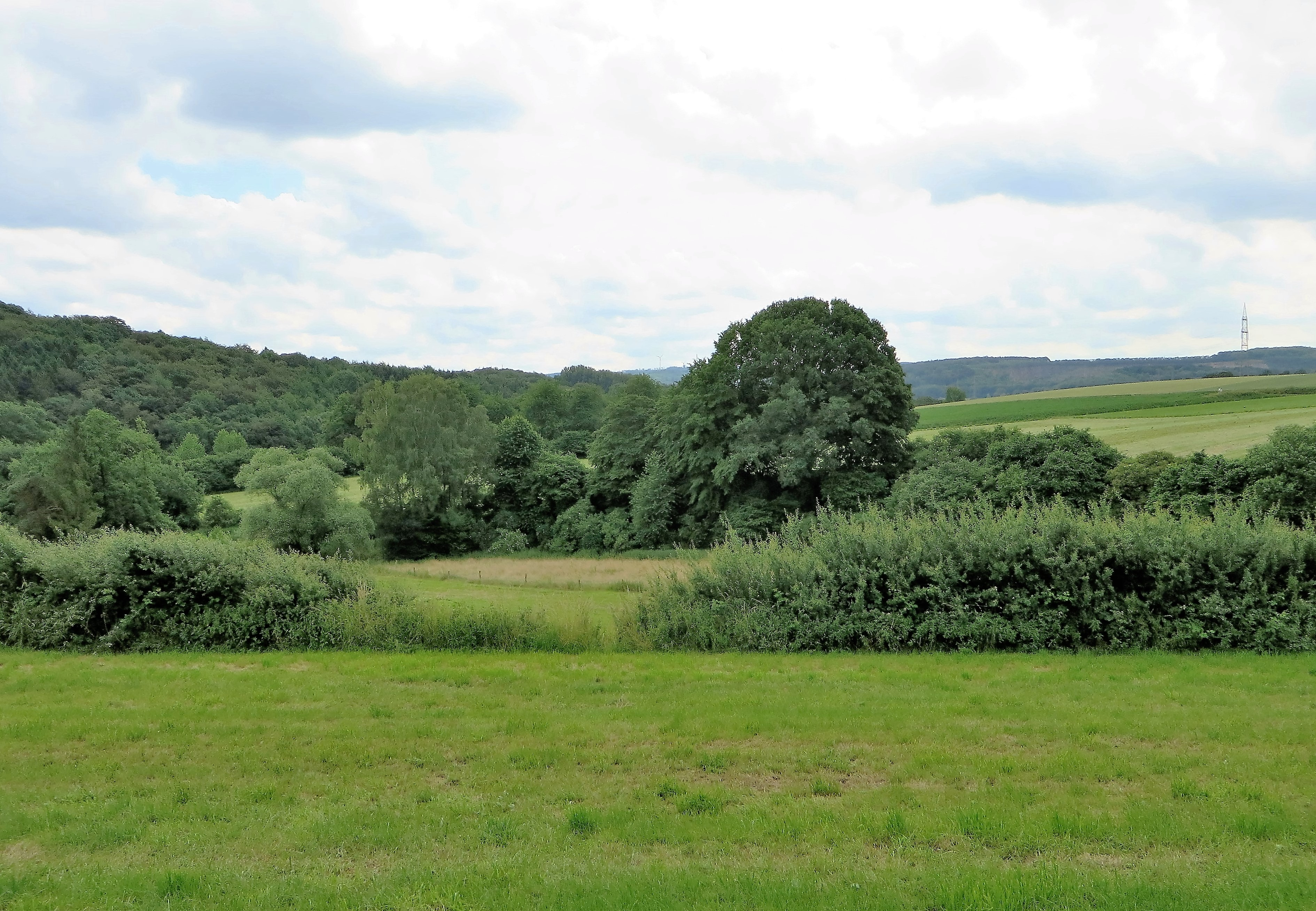 Landschaftsschutzgebiet „Berchumer Heide, Reher Heide“ im Hagener Stadtteil Berchum. Großes Wald-, Feld- und Weidegebiet in Berchum und Hohenlimburg-Reh mit der höchsten Erhebung Rehberg (229 m). Blick vom Friedhof Berchum auf einen Teilbereich der Berchumer Heide. Auf dem Foto sieht man links auch ein Teilstück von dem Naturschutzgebiet „Unteres Wannebachtal“. Auf der Reher Heide befindet sich in der Nähe der Schälker Landstraße eine historische Richtstätte der Grafschaft Limburg, der Reher Galgen, kenntlich gemacht durch einen kleinen Erdhügel und ein Denkmalstein (letzte Hinrichtung am 19. Juni 1807).